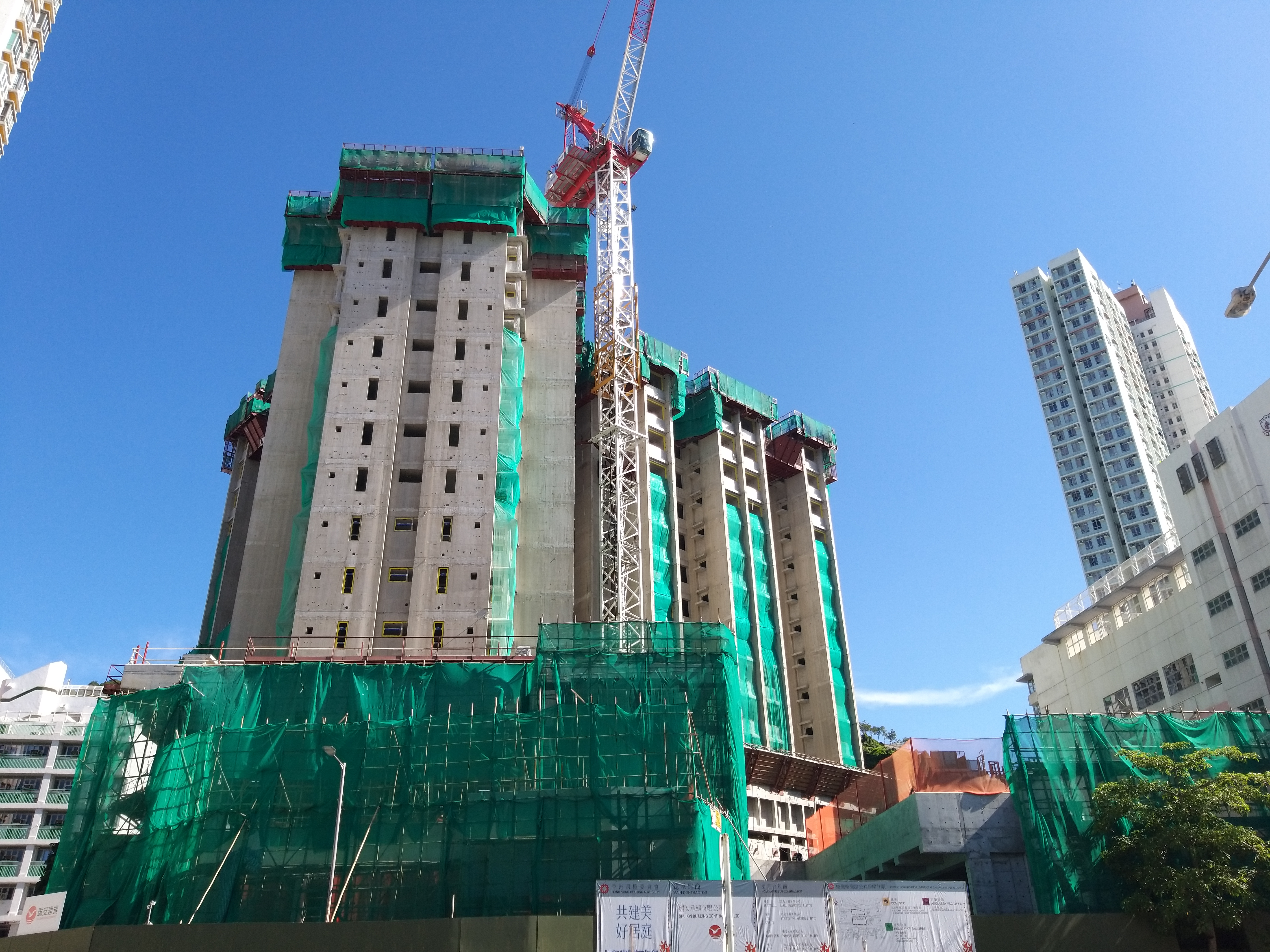 大廈開始顯高